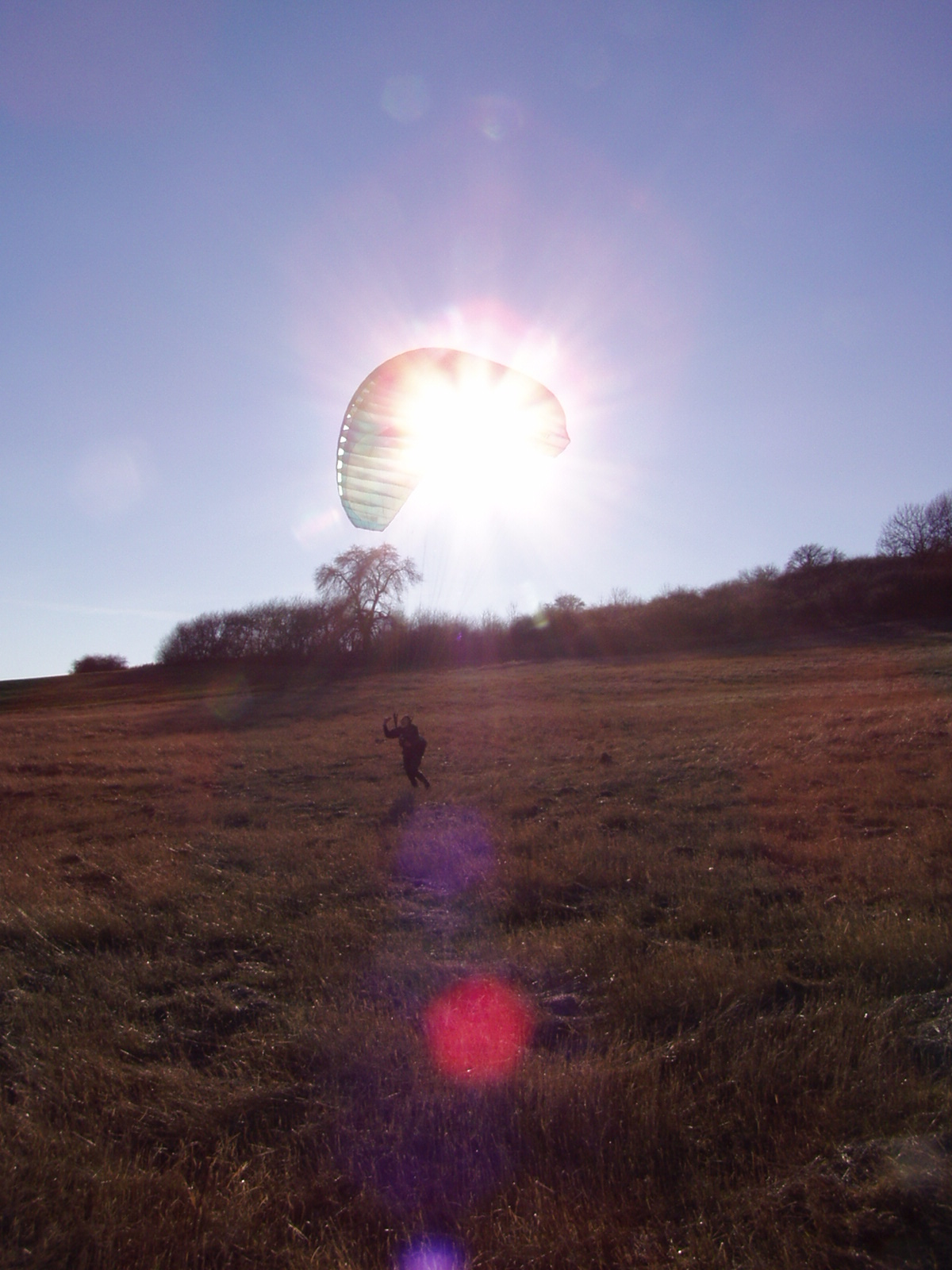 Seznámení s padákovým kluzákem